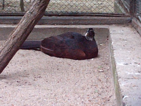 Czubacze - czubacz rudy (Crax rubra)